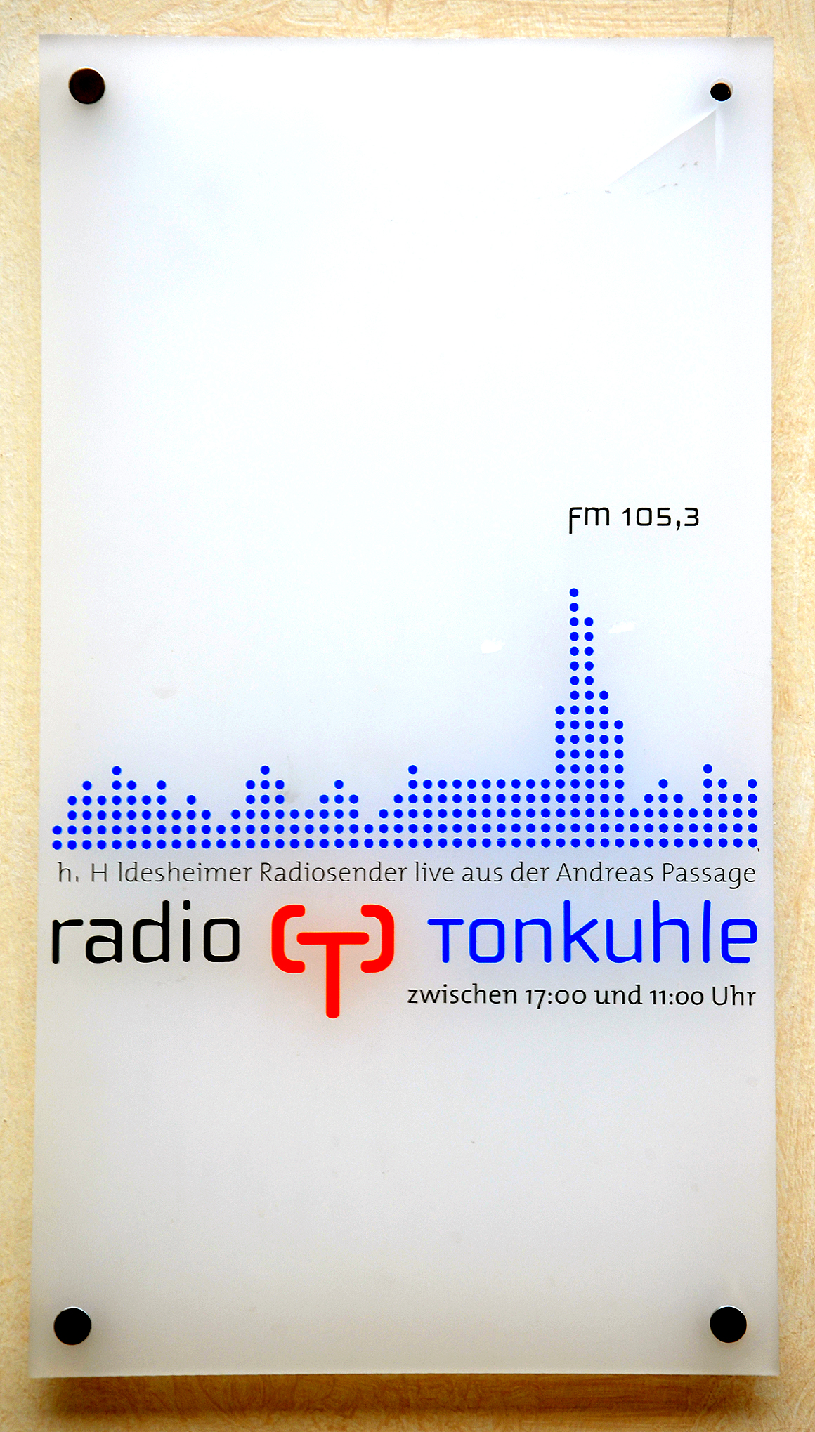 Eine Tafel radio TONKuhle, mit der der Sender unter anderem darauf hinweist, das der „[...] Hildesheimer Radiosender live aus der Andreaspassage [...] zwischen 17:00 und 11:00 Uhr“ auf der Frequenz fm 105,3 sendet ...